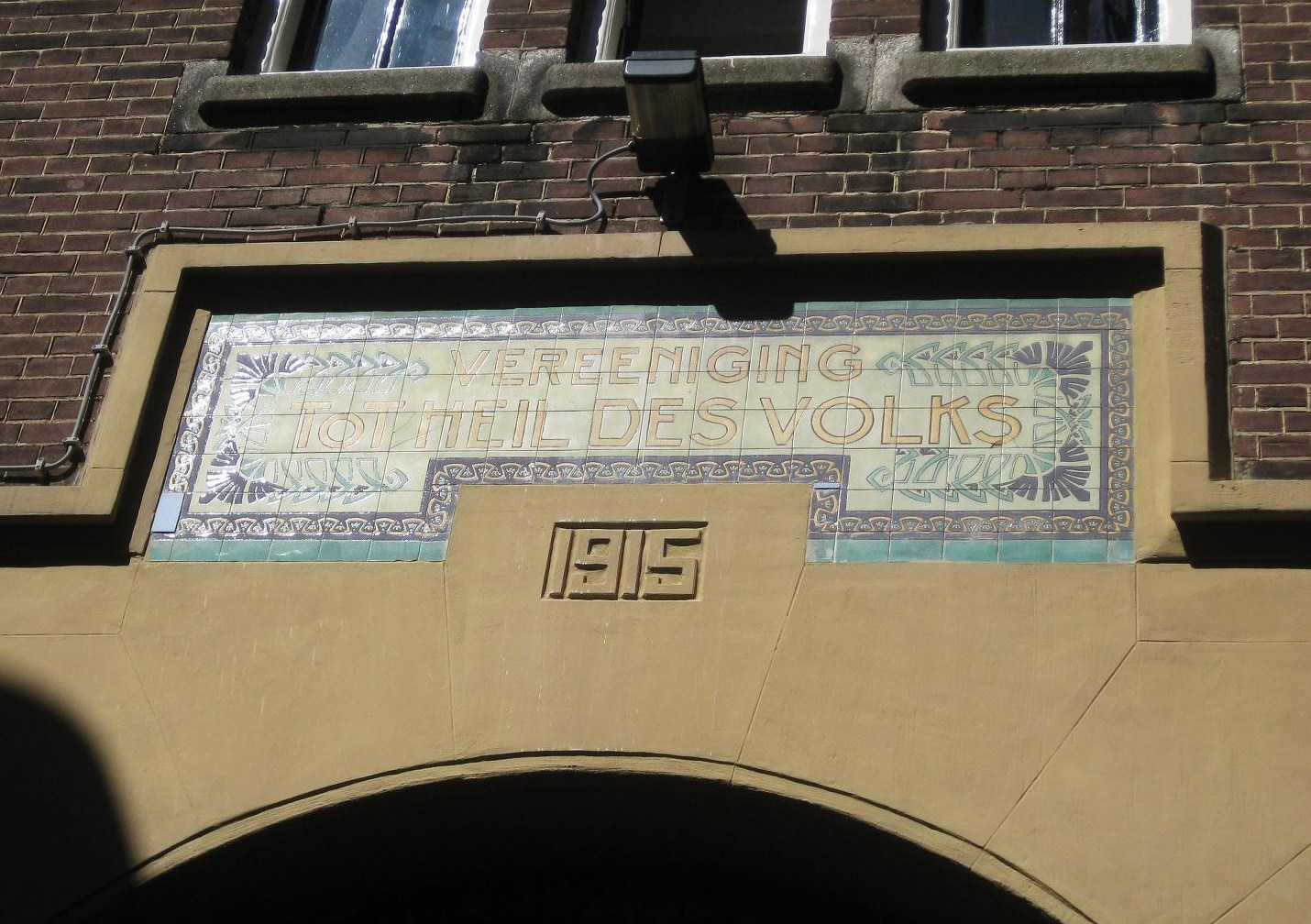 Tegeltableau Tot heil des Volks, Barndesteeg 21-25, Amsterdam